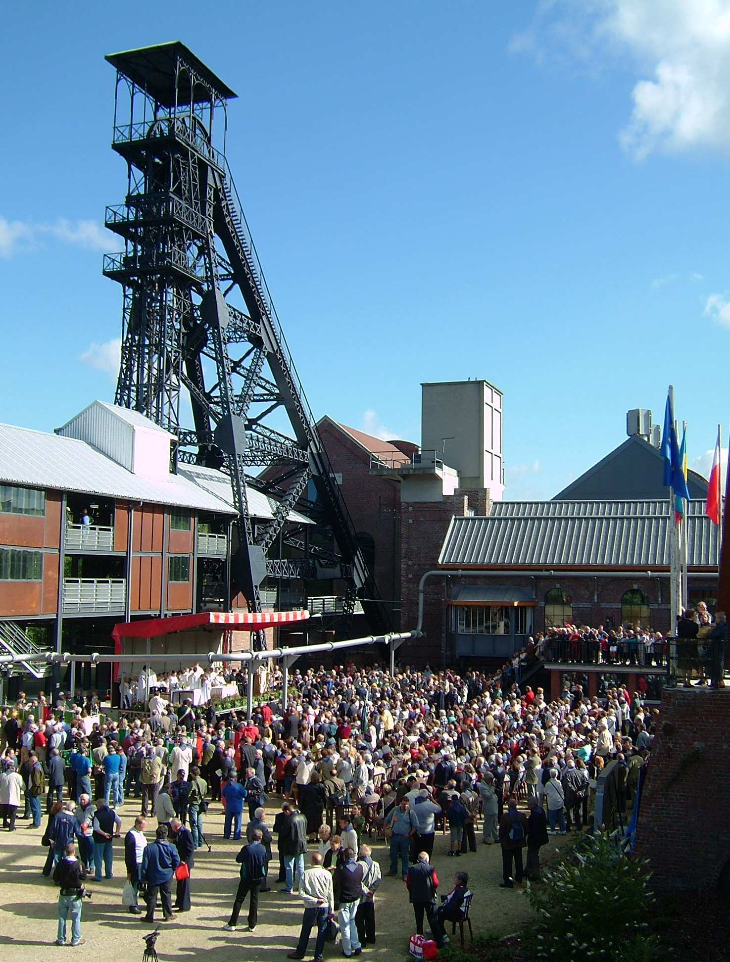 Bois du Cazier